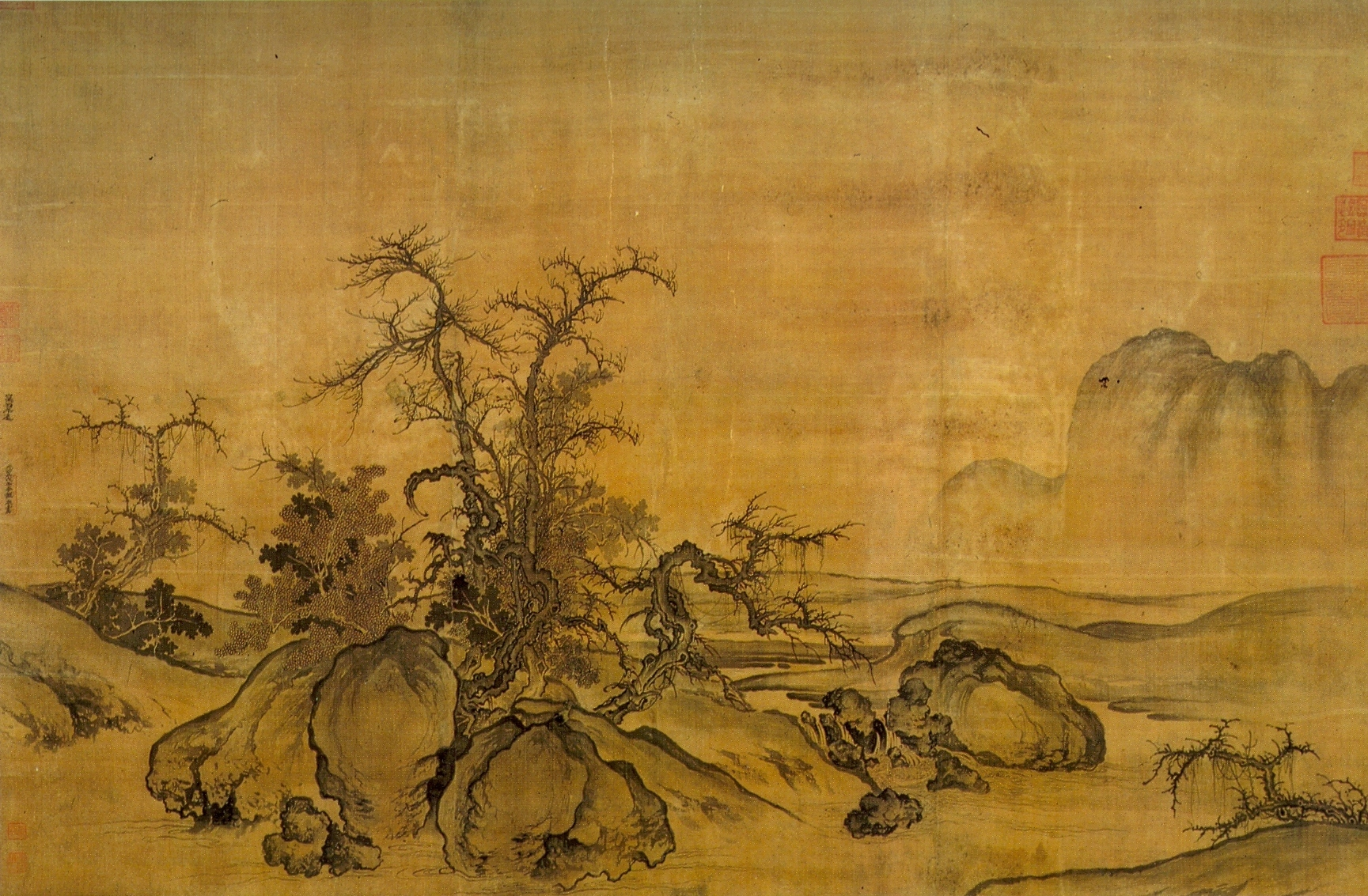 Каменистая равнина и далекий горизонт.